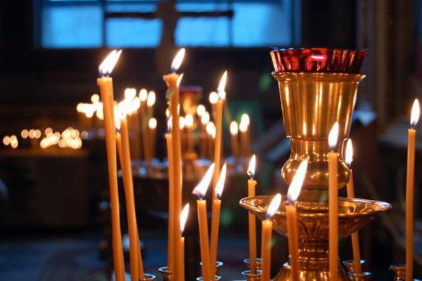 Isak-katedralen